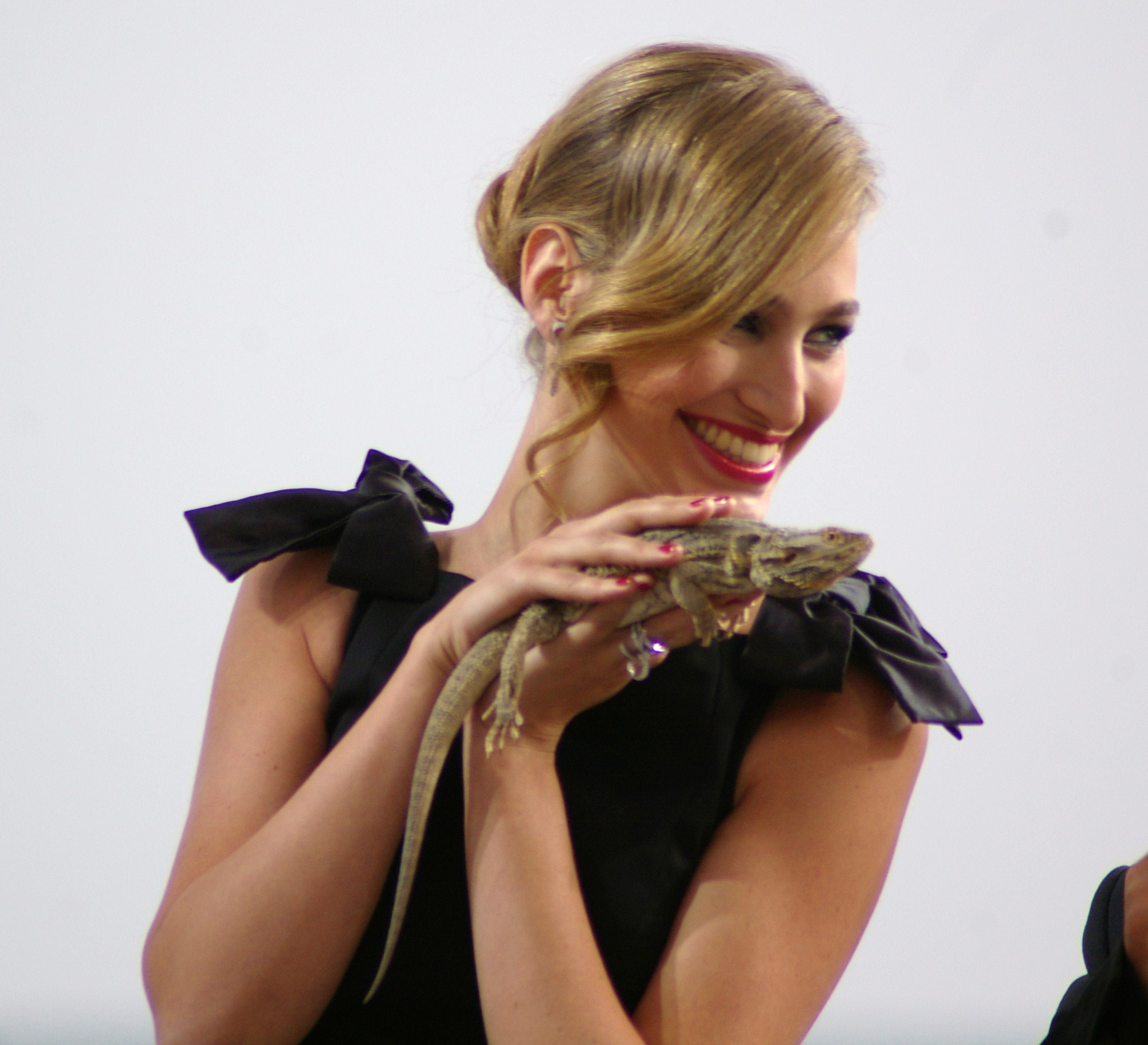 Pauline Lefèvre dans l'émission Le Grand Journal sur Canal+ le 19 mai 2010 durant le festival de Cannes.